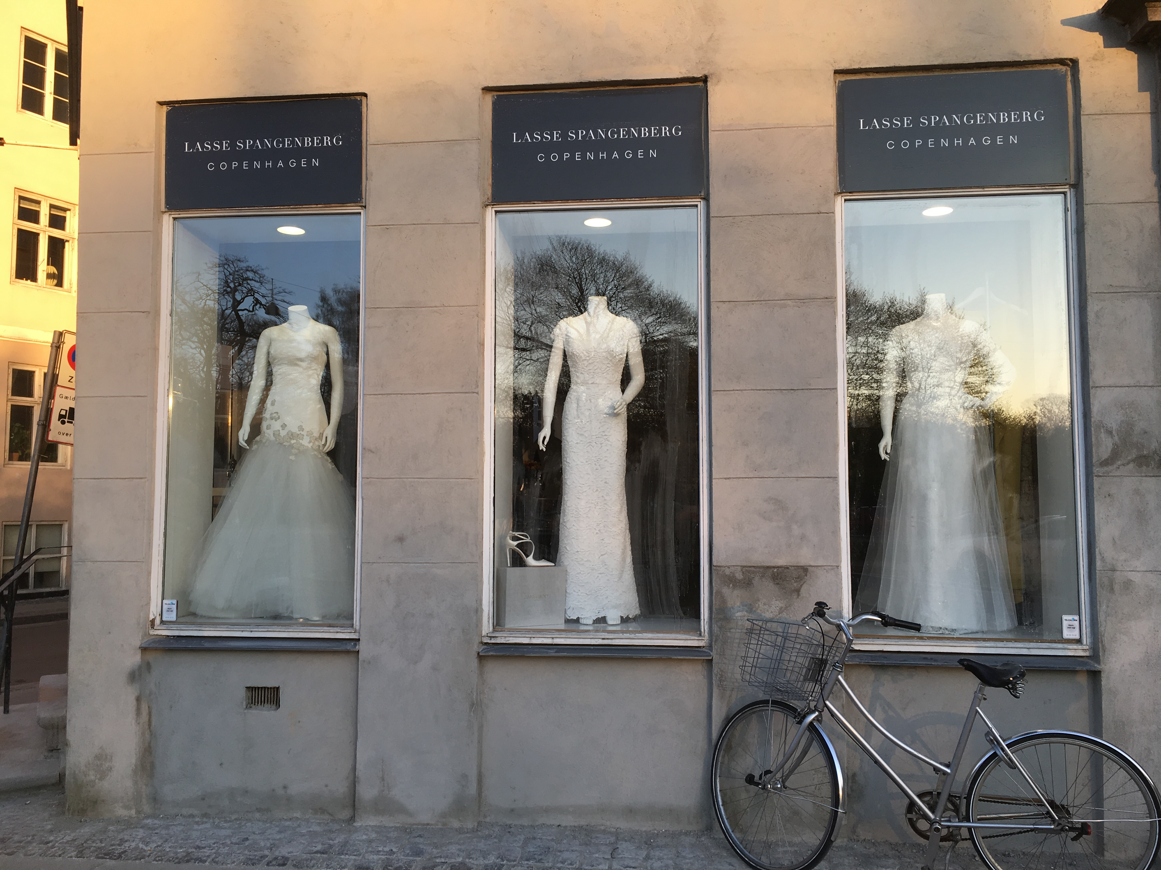 Den danske kjoledesigner Lasser Spangenbergs butik på Nørre Voldgade